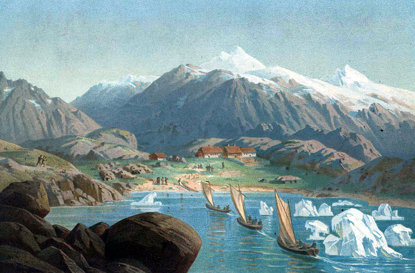 Ankunft der Boote der "Hansa" in Friedrichsthal, Grönland.